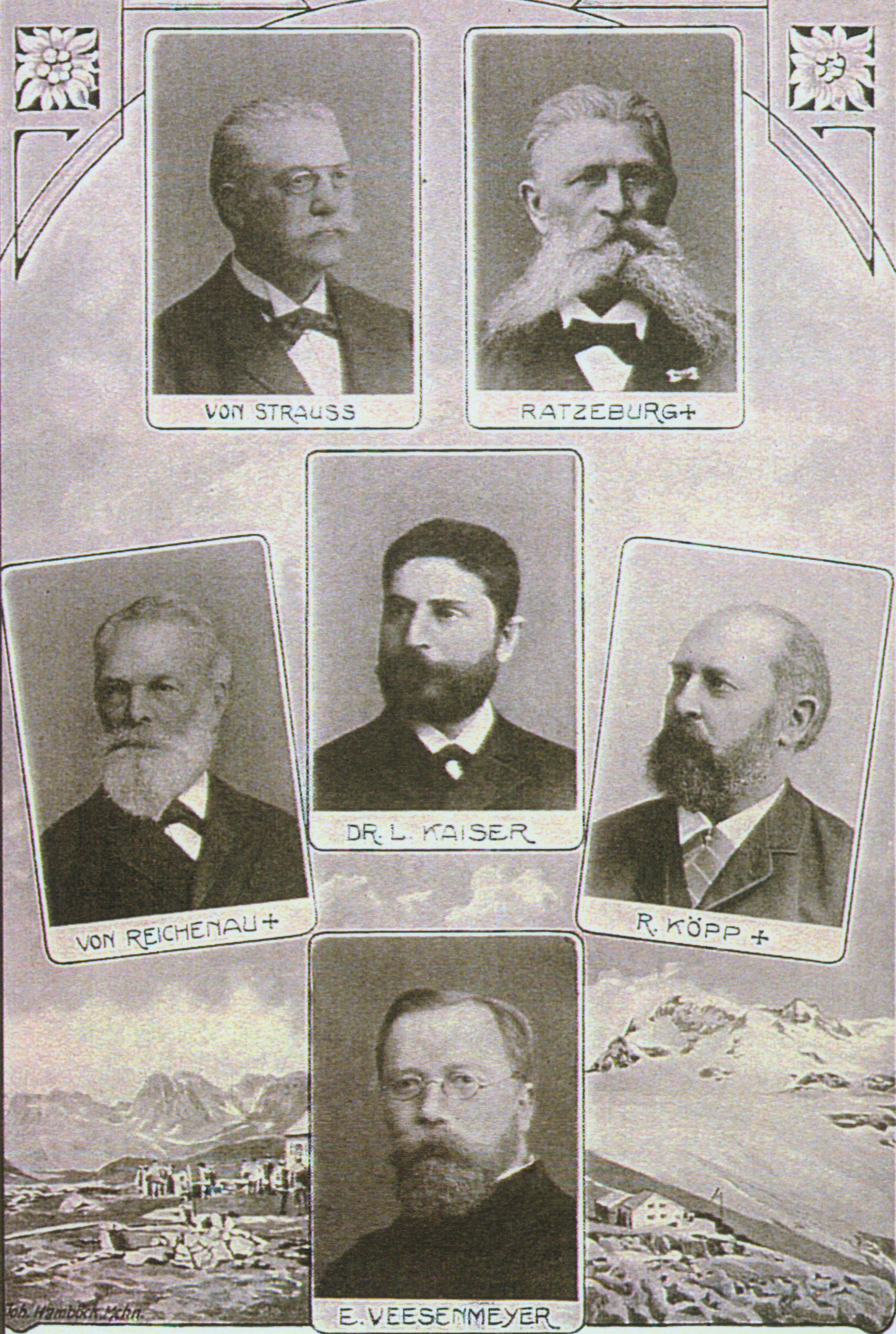 Sektionsvorsitzende von 1882 bis 1924.